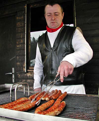 Thüringer Rostbrater bei der Arbeit, Bratwurststand Wegscheide, Oberhof (Thüringen)